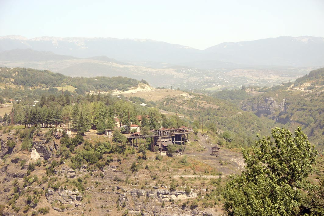 Tschiatura - Verladestation für Manganerz